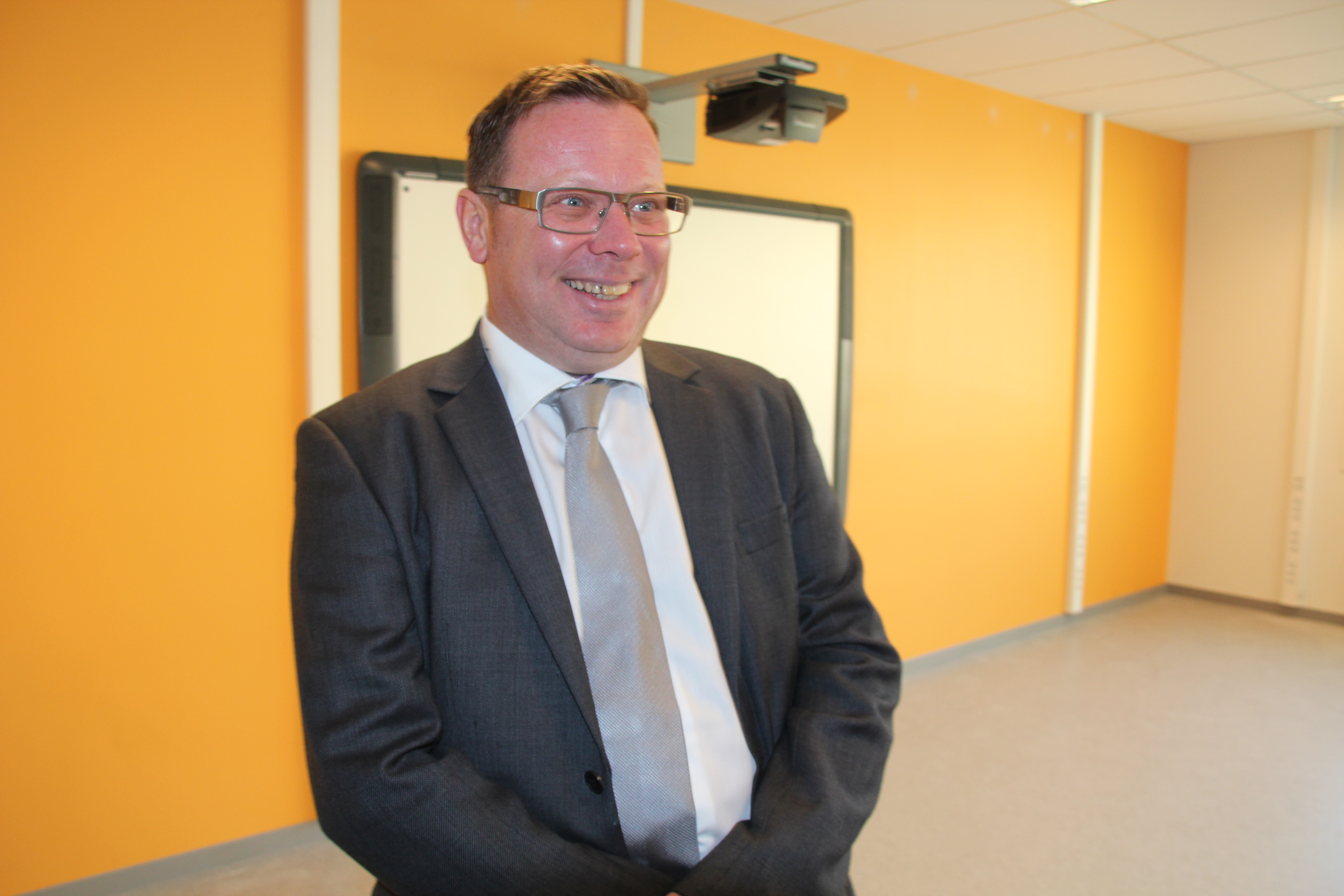 Rektor Geir Nyborg ved St. Franciskus Skole.